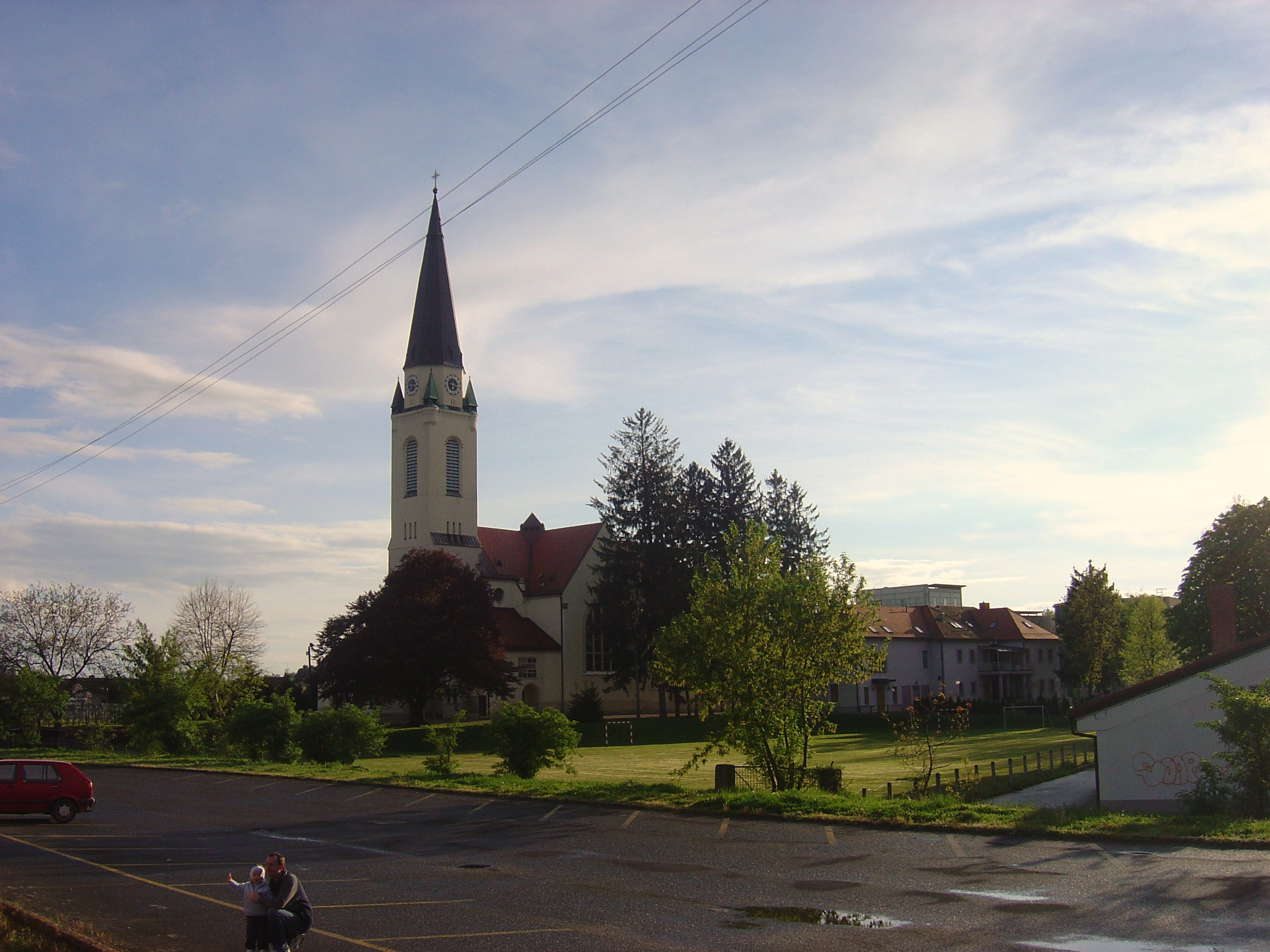 Murska Sobota, Slovenia